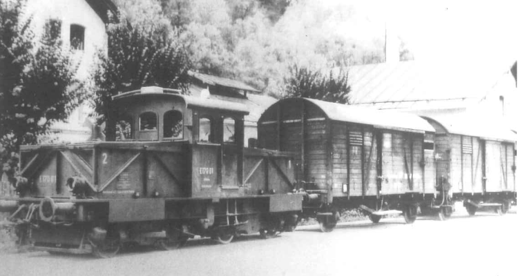 E 170 01 als Akkulok in Berchtesgaden